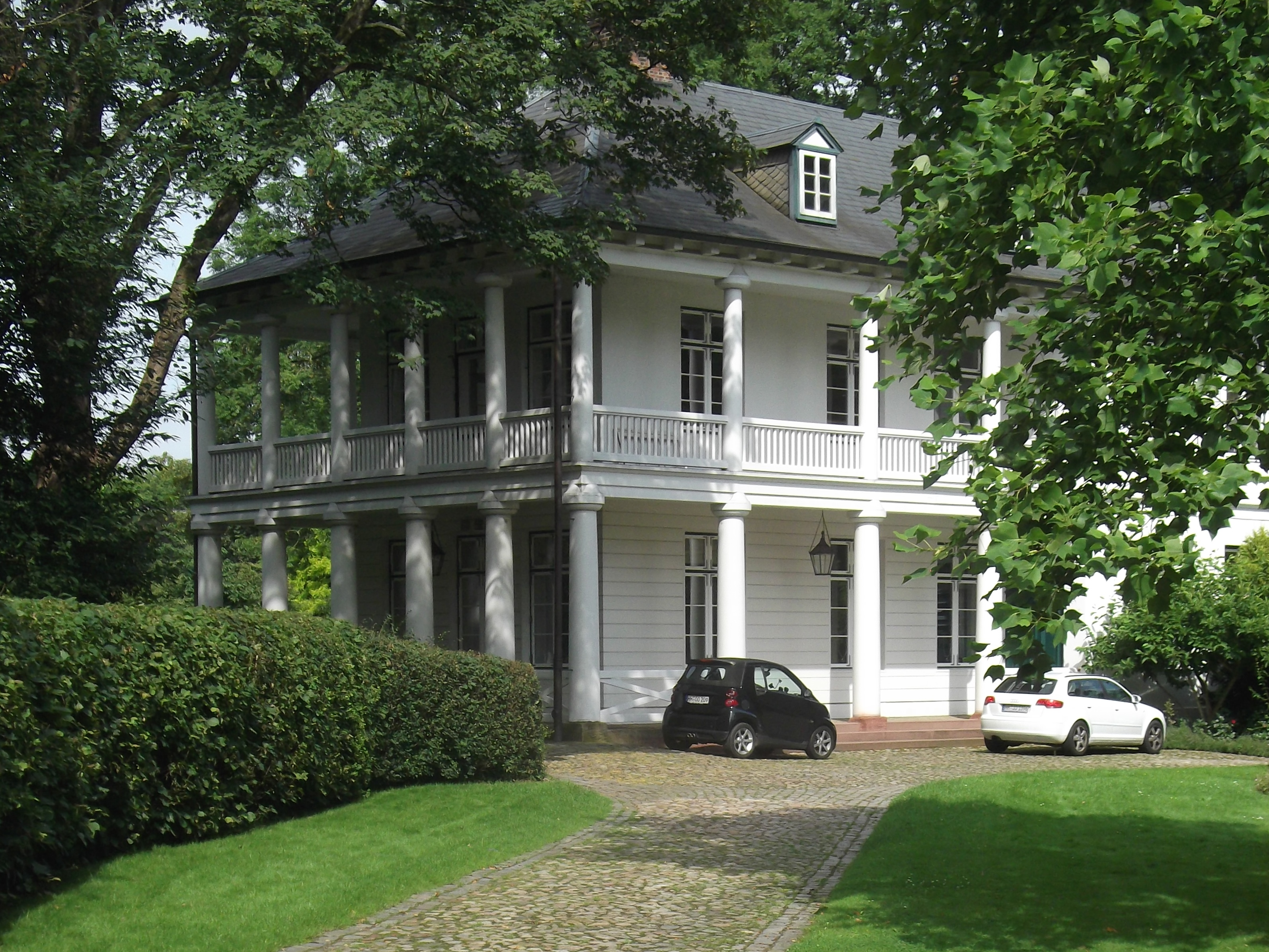 Hamburg, August 2015 This is a photograph of an architectural monument.